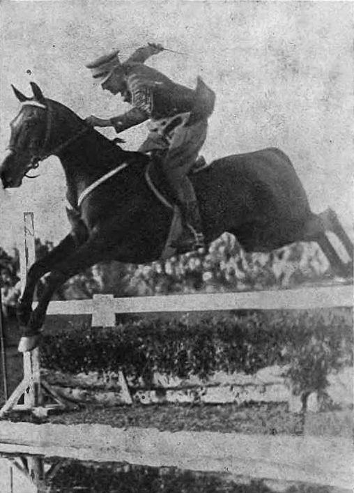 Adam Królikiewicz na koniu Milord podczas zawodów hippicznych w warszawskich Łazienkach w czerwcu 1930.